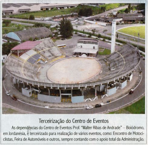 Boiodromo